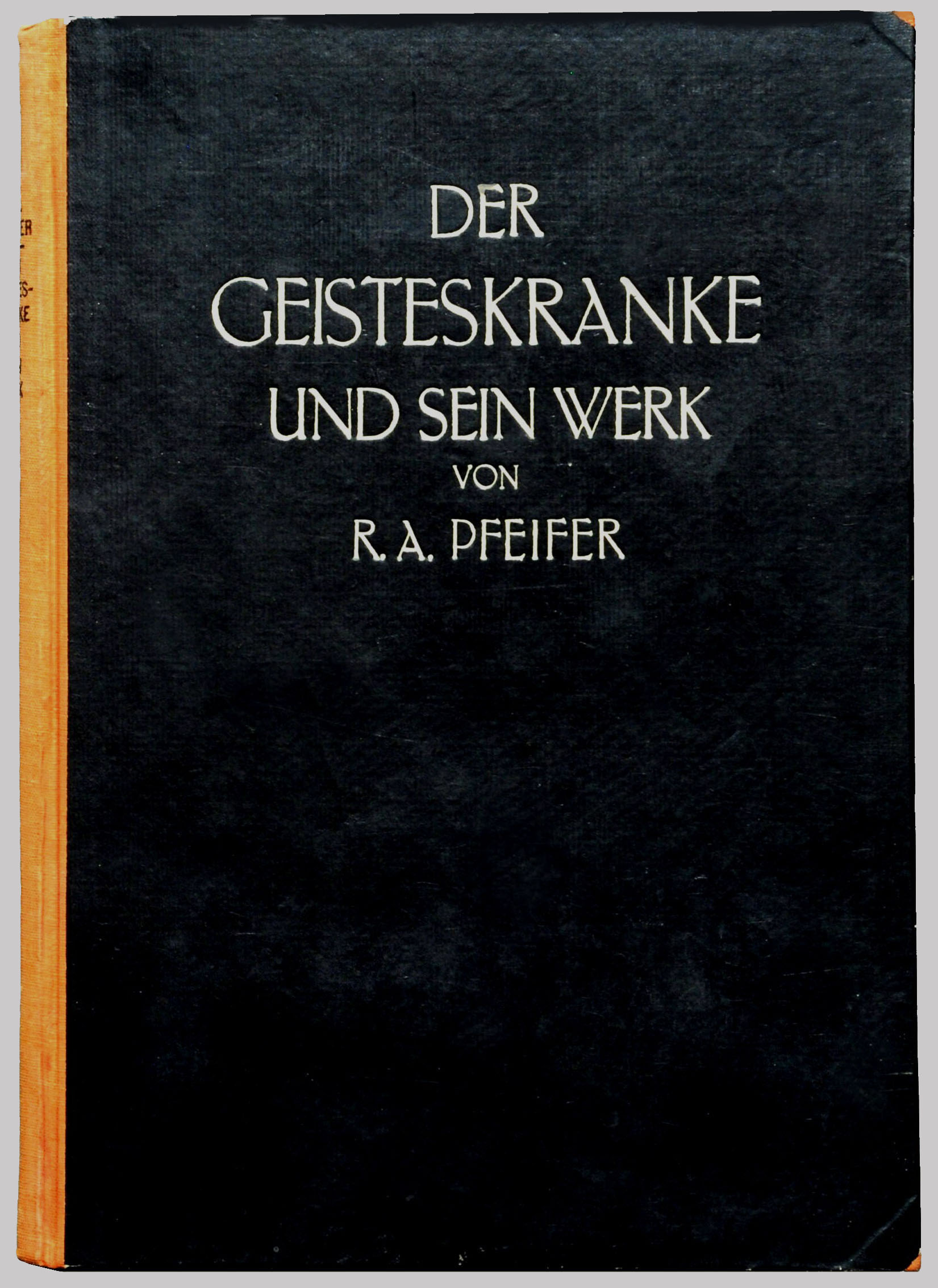 Pfeifer, R. A.: Der Geisteskranke und sein Werk. Eine Studie über schizophrene Kunst. Mit 45 Abbildungen. Leipzig: A. Kröner 1923. Erstdruck. Richard Arwed Pfeifer (1877-1957), Psychiater und Hirnforscher in Leipzig, untersucht in diesem Werk die diagnostische Bedeutung von bildnerischen Produktionen Schizophrener.